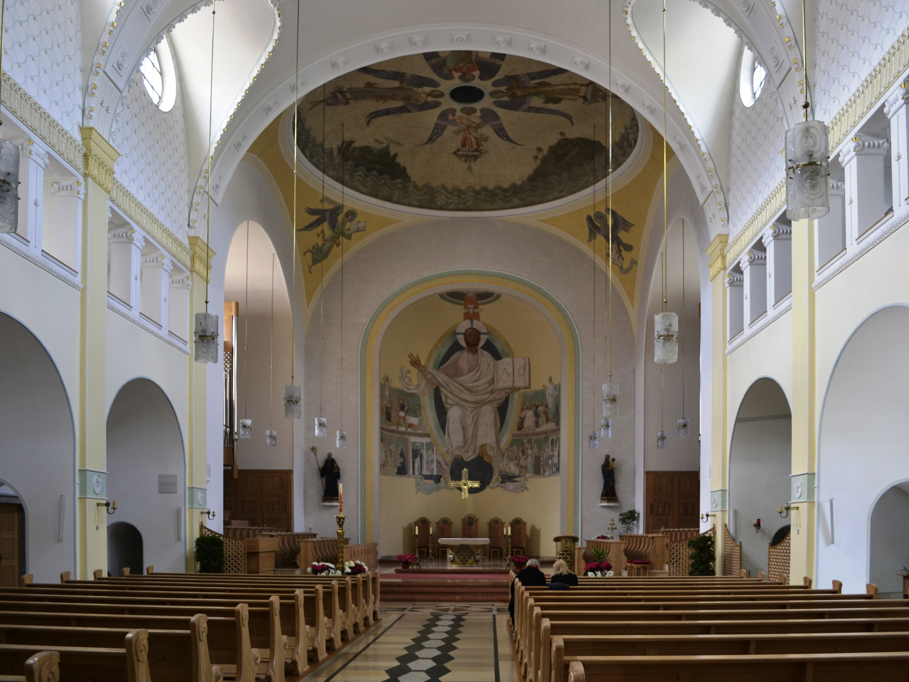 Im Inneren der Klosterkirche der Abtei Schweiklberg.